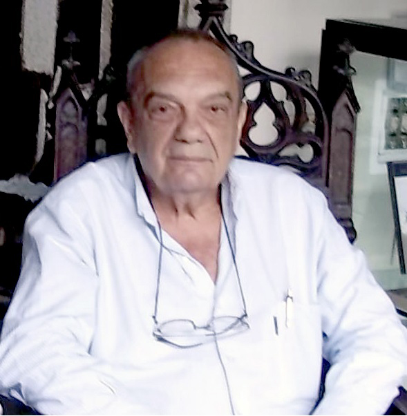 Retrato de Napoleón Pisani Pardi